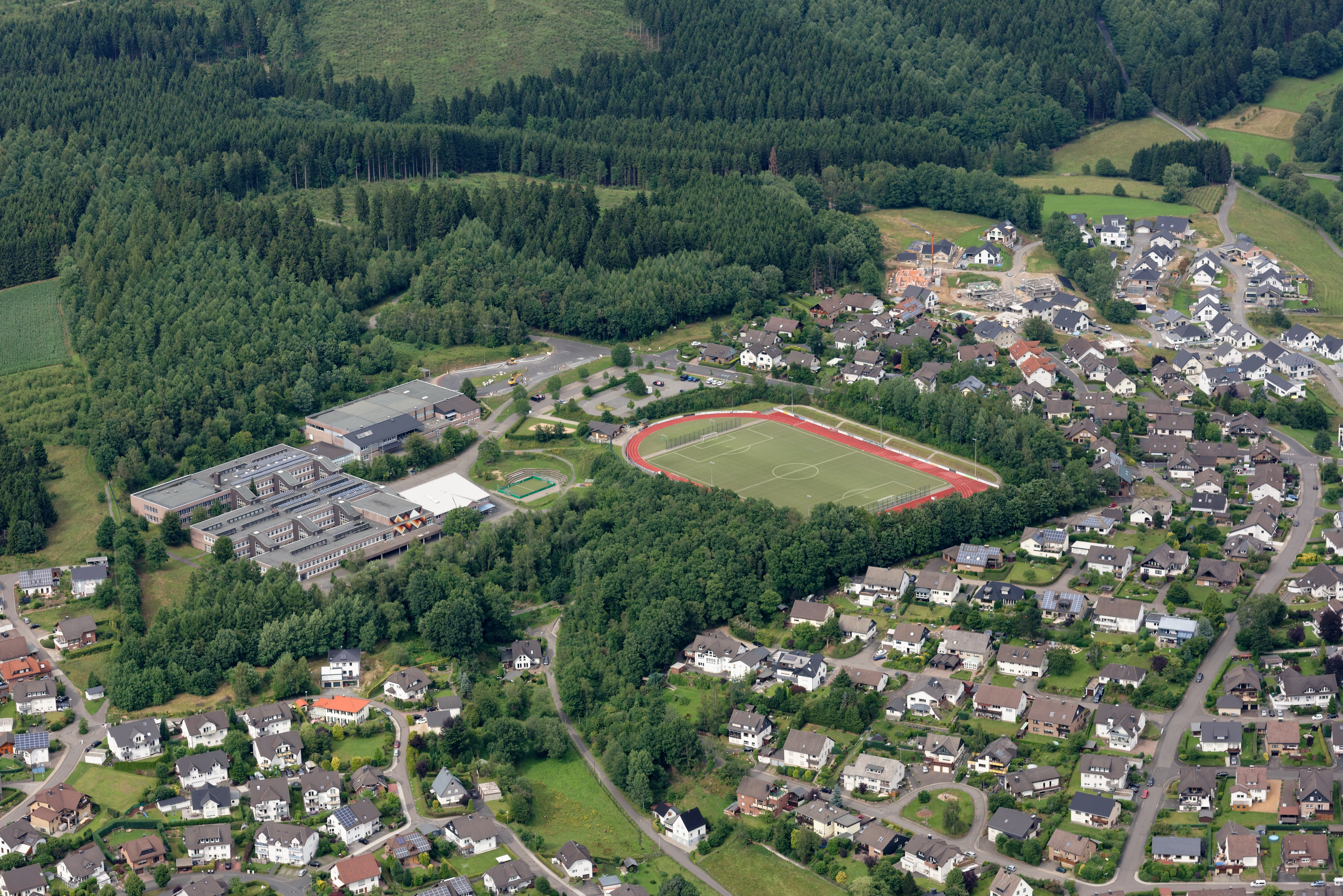 Luftaufnahme: Konrad-Adenauer-Schule und Realschule (Mitte links), Sportplatz und Wohngebiete von Wenden, Nordrhein-Westfalen